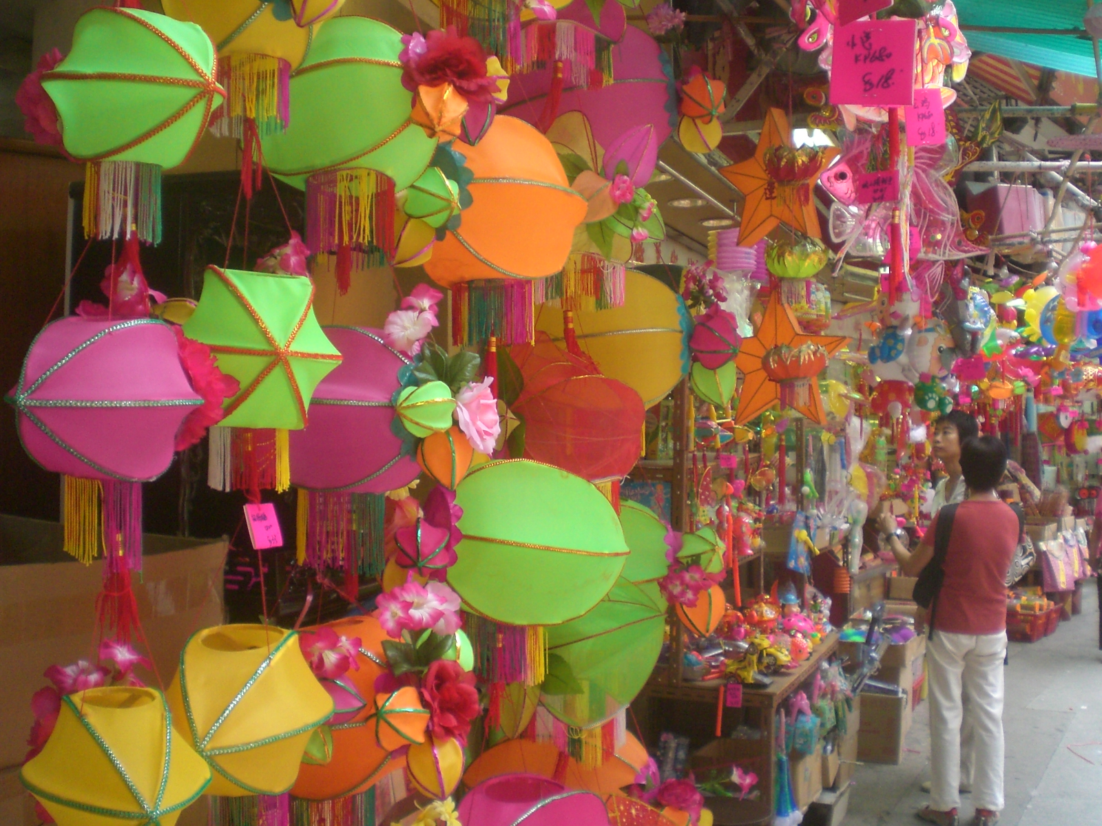 西環 皇后大道西 燈籠